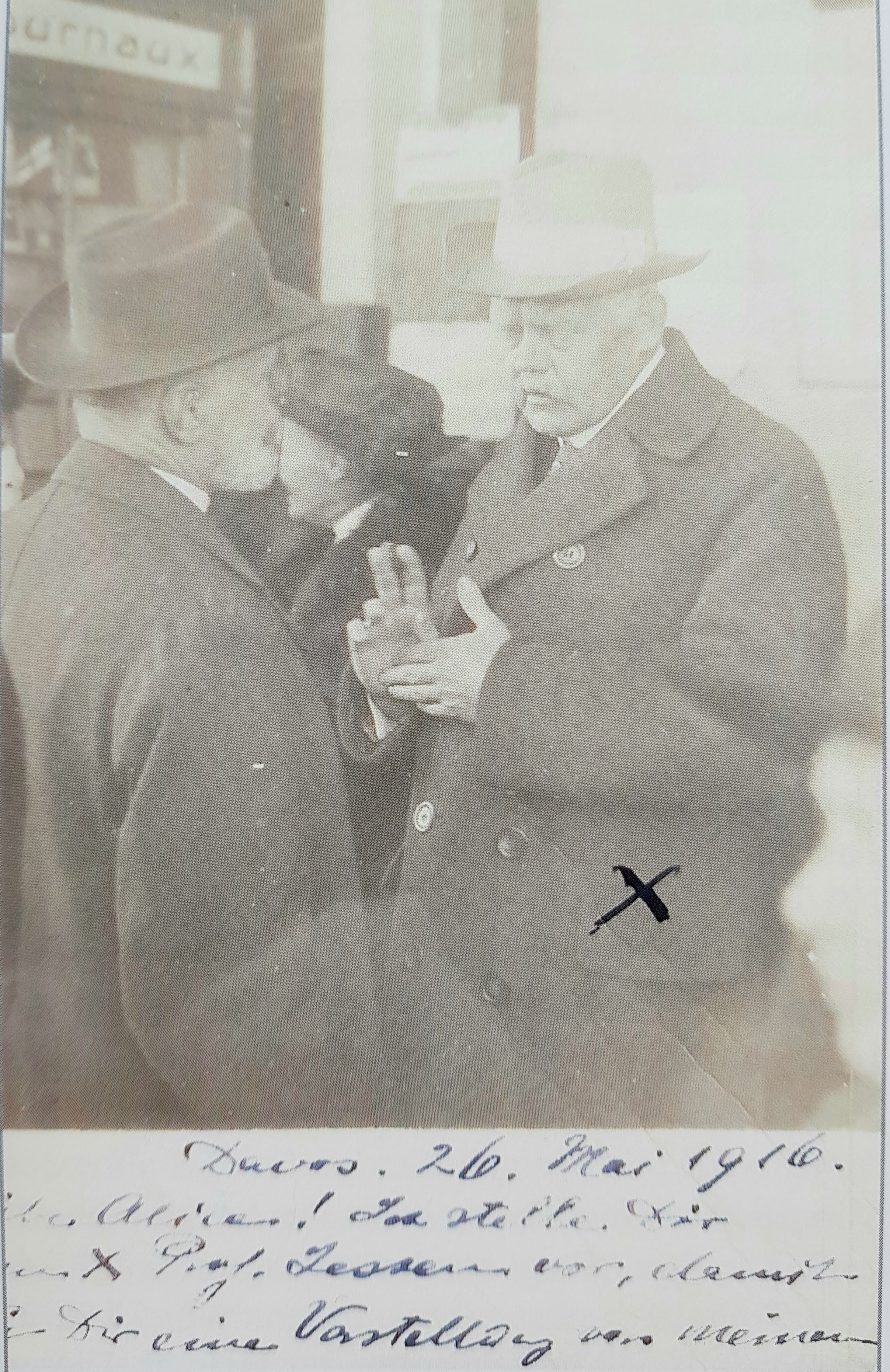 Geheimrat Professor Dr. Friedrich Jessen, aus Postkarte im Familienbesitz, Jahr 1916